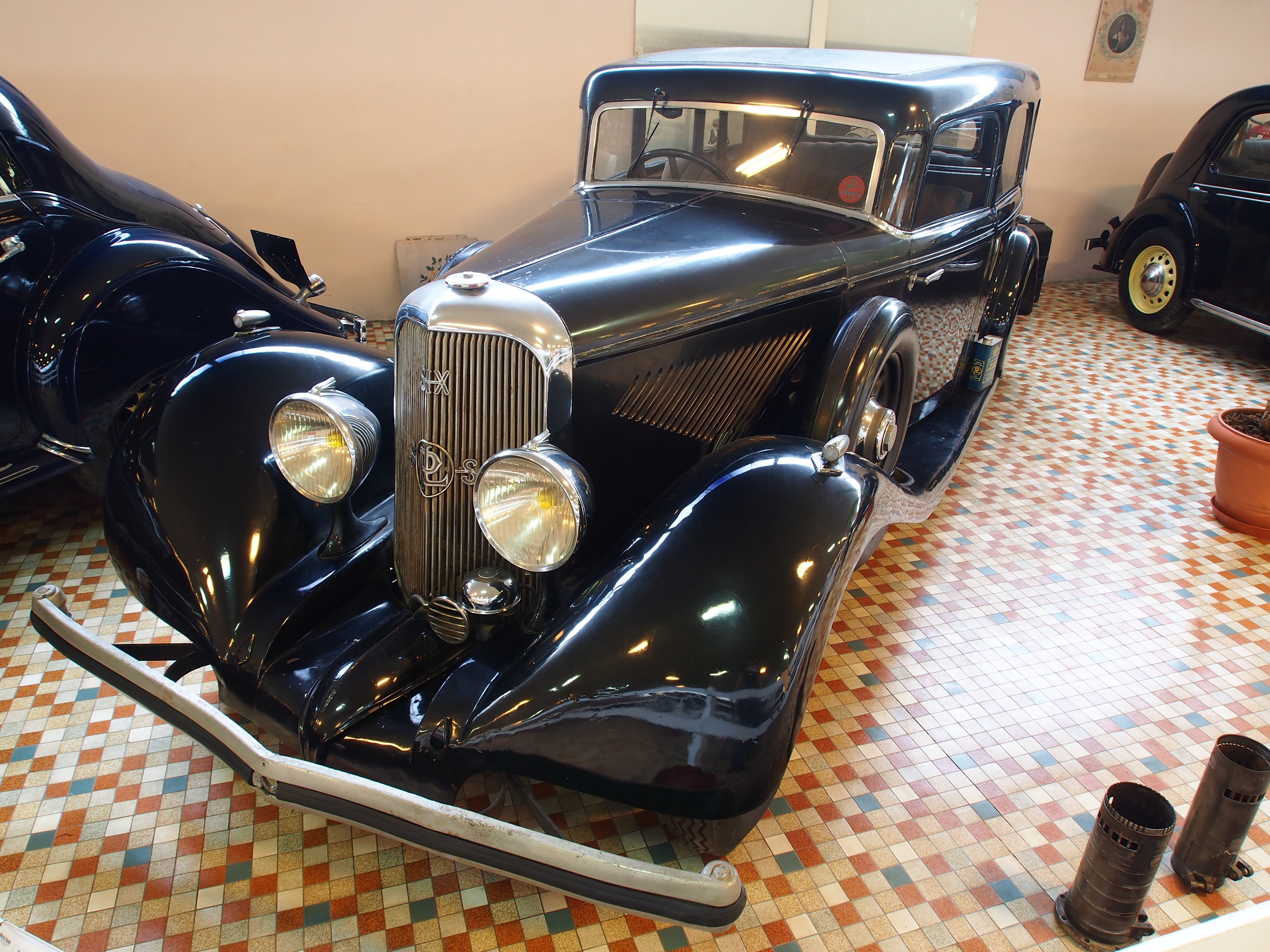 Photographed at the Musée Automobile de Vendée, France.